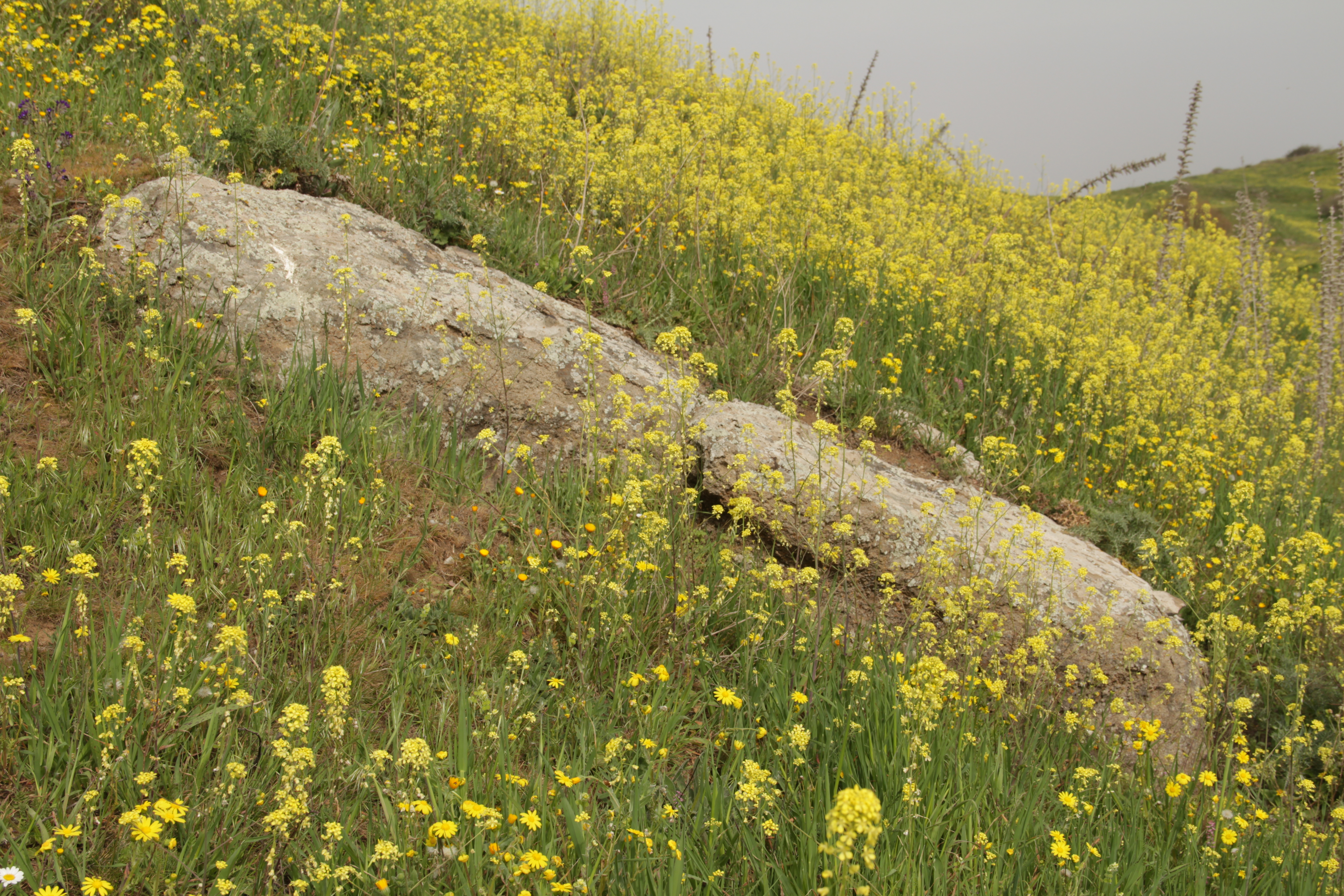 סלע טוף על המדרון הדרומי של התל הגעשי בנטל ברמת הגולן, ישראל